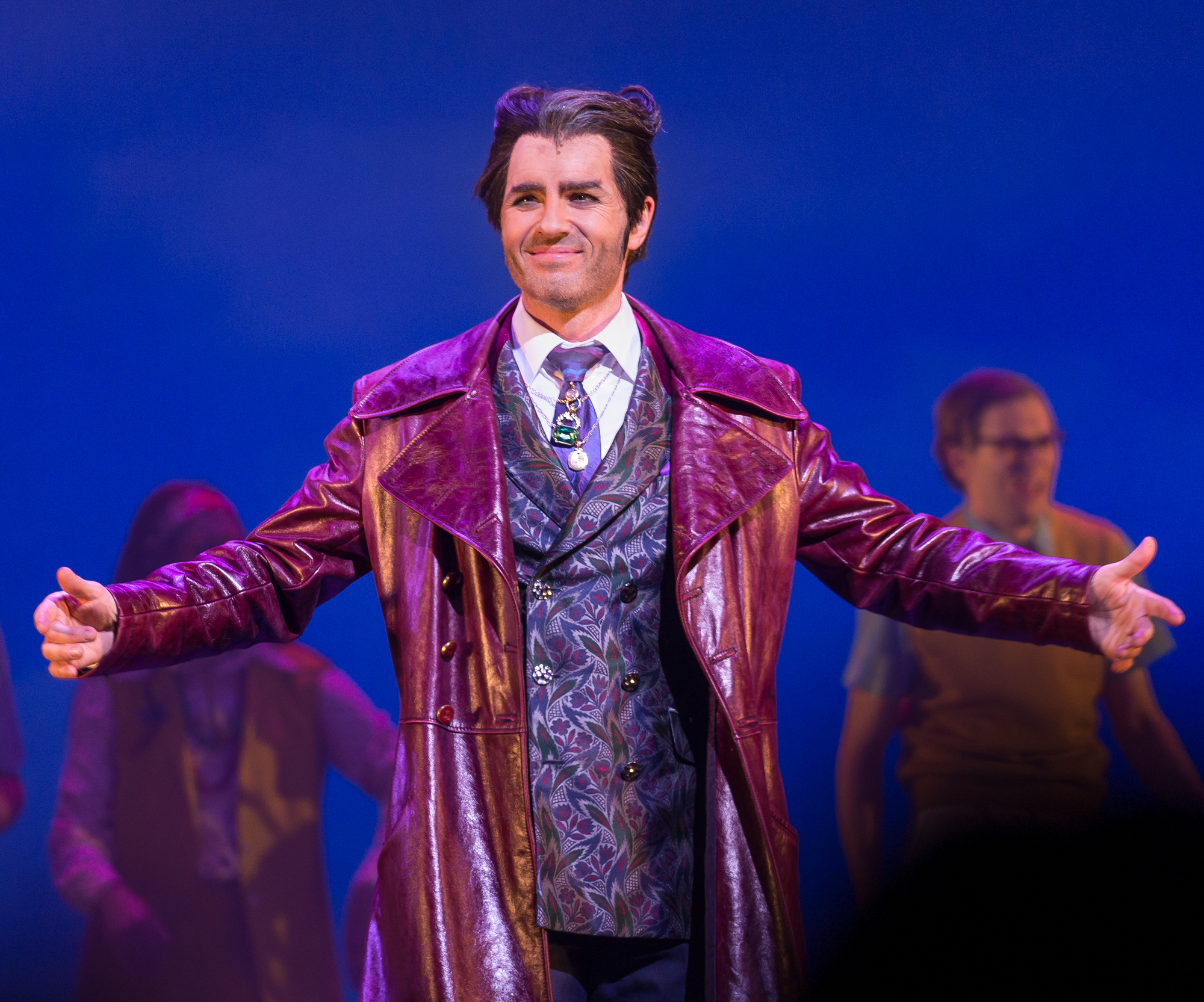 Häxorna i Eastwick på Cirkus i Stockholm 2019-2020. Med Peter Jöback, Linda Olsson, Kayo Shekoni, Vanna Rosenberg, Sussie Eriksson, Jan Mybrand med flera.